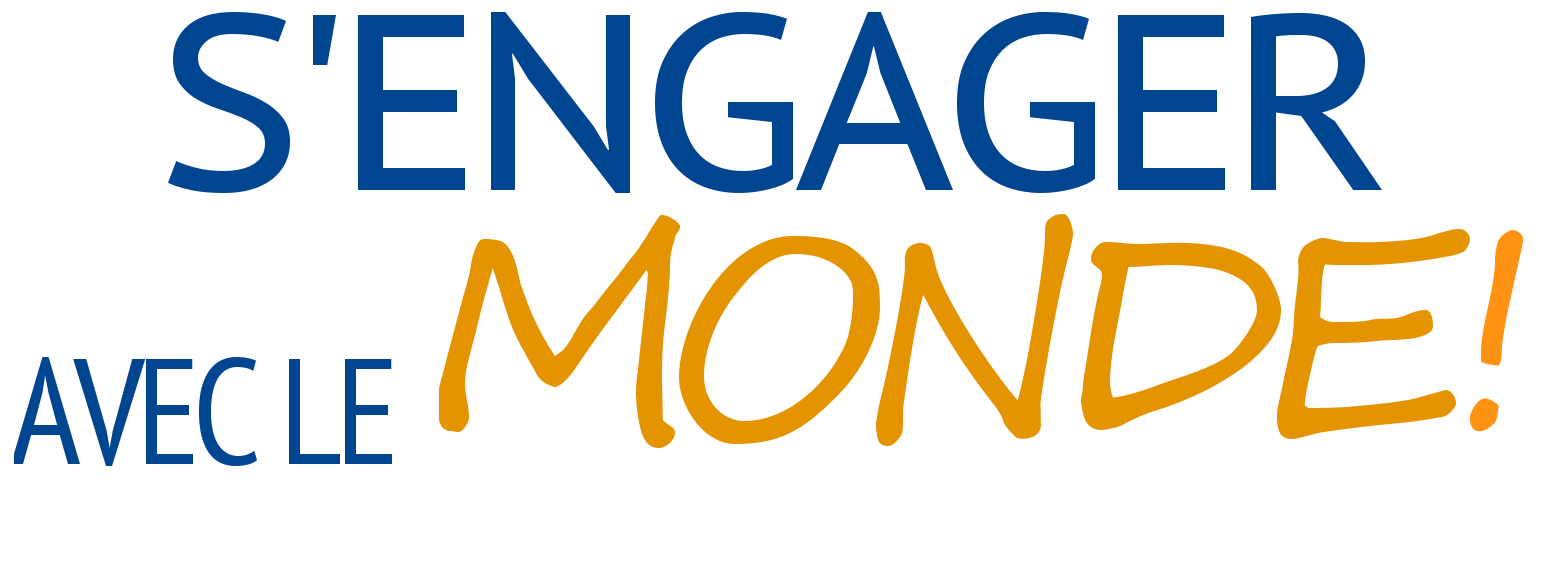 Logo de [Chantiers jeunesse]